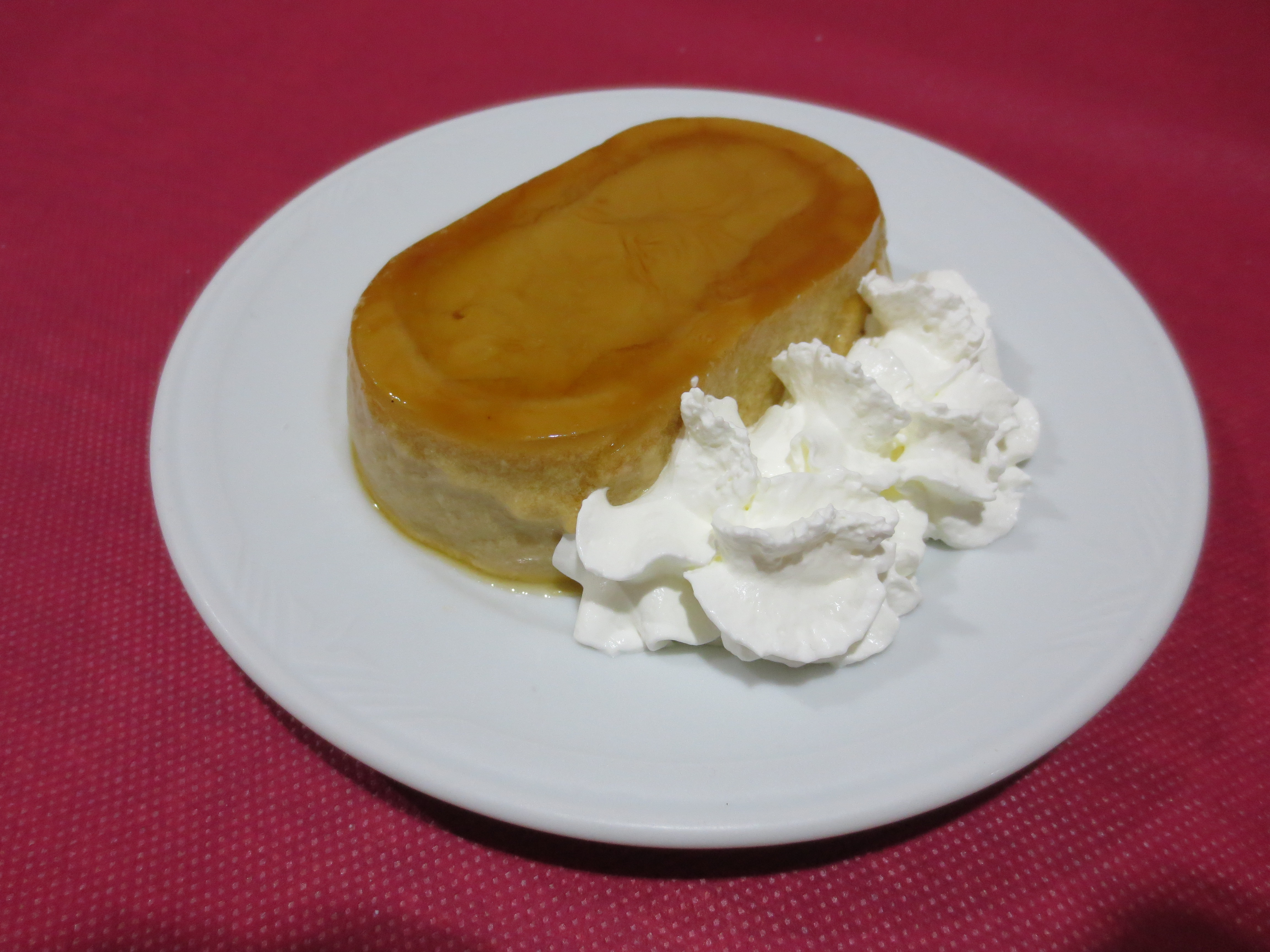 Flan de café con thermomix